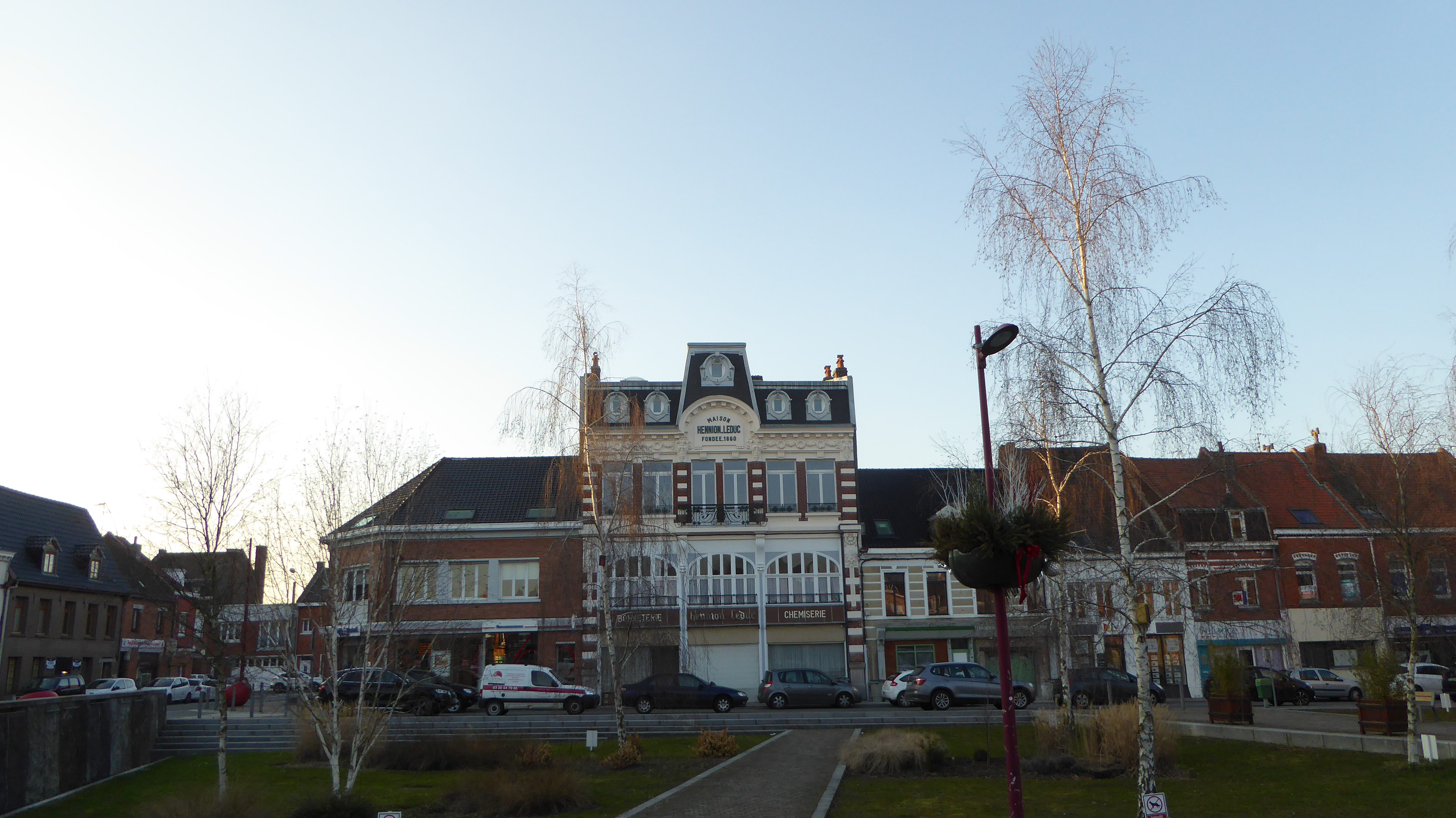 Maison Hennion Leduc à Orchies Nord Hauts-de-France